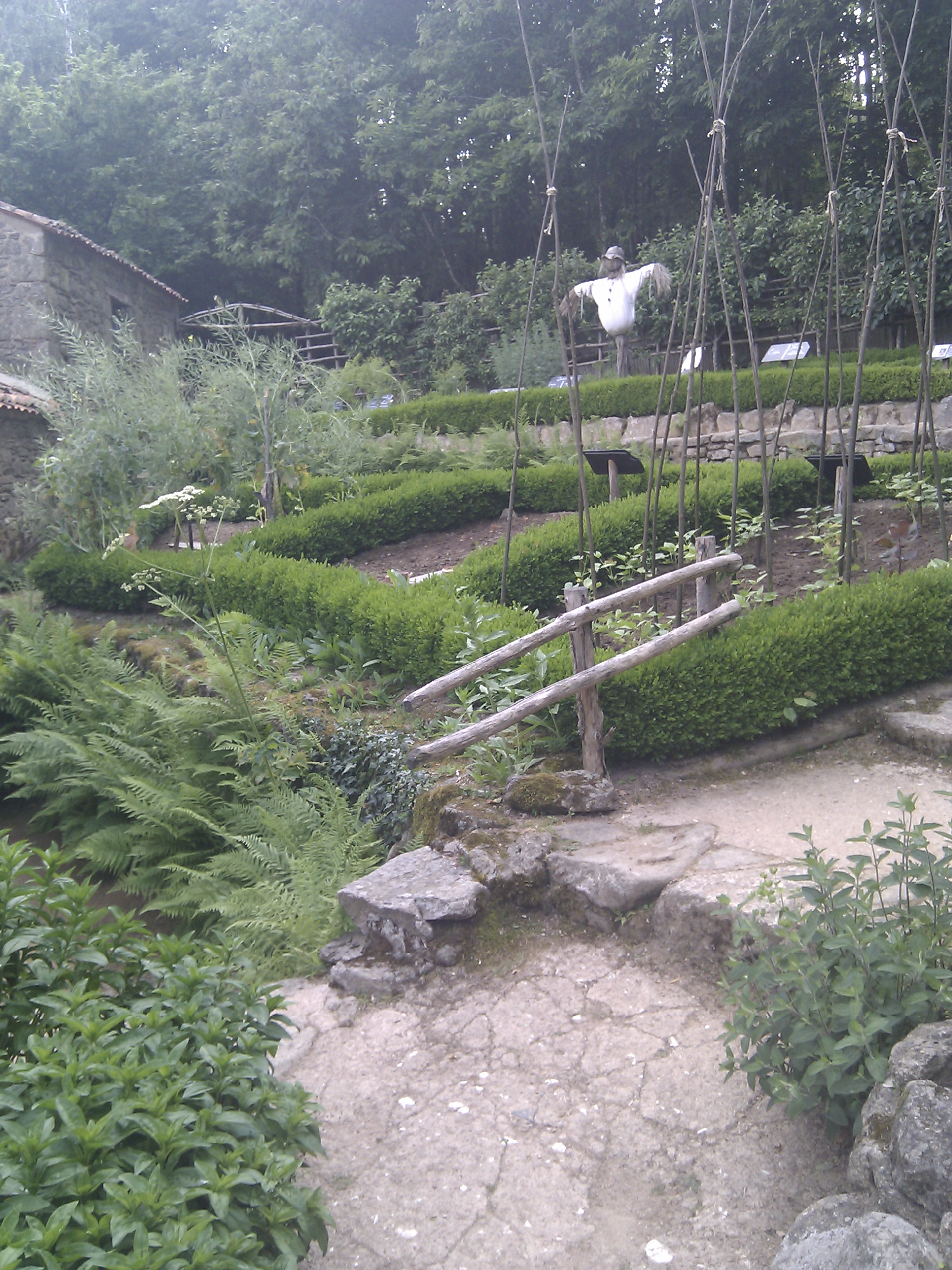 Jardin de la boutique de la parfumerie dans le village médiéval au Puy du Fou.